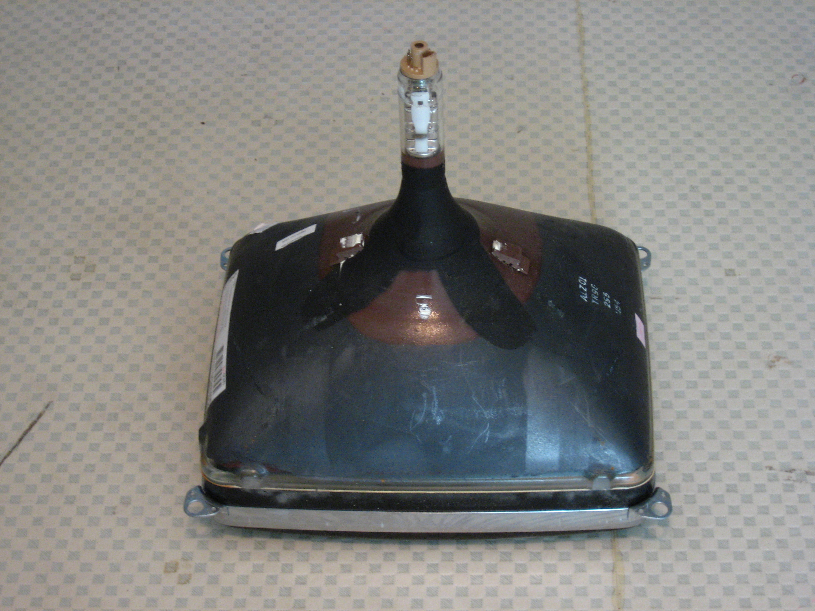 Television kuvaputki, katodisädeputki / Cathode ray tube